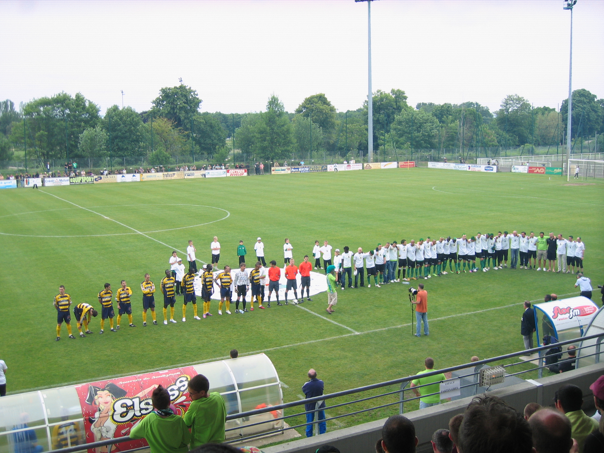 Dernier match de la saison 2009-2010 en CFA le 29 mai 2010. Colmar (en vert) contre Épinal (en jaune et noir) 2-2